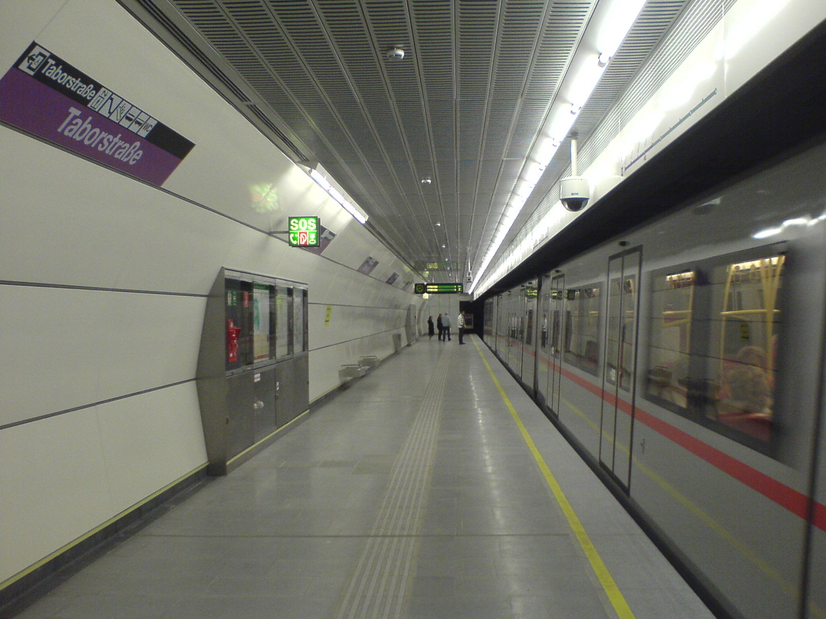 Bahnsteige der Station Taborstraße. Neue Station Taborstraße.